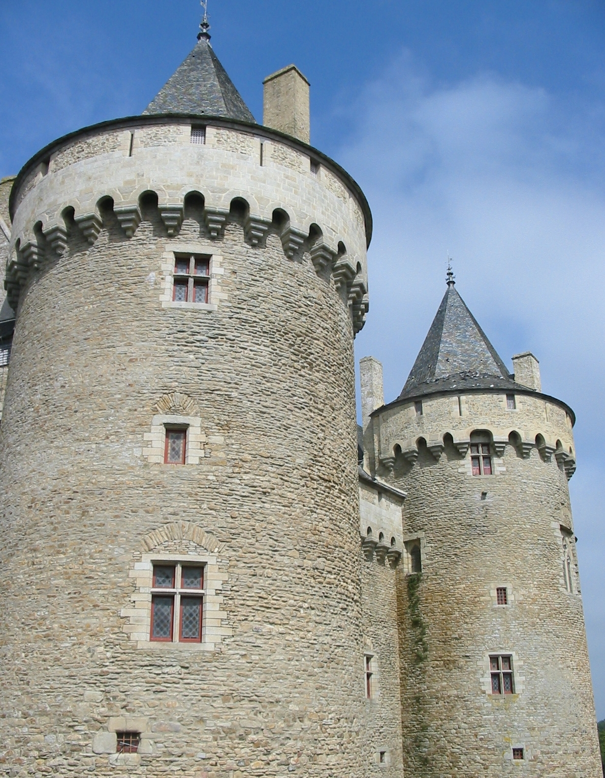 Suscinio castle, Brittany